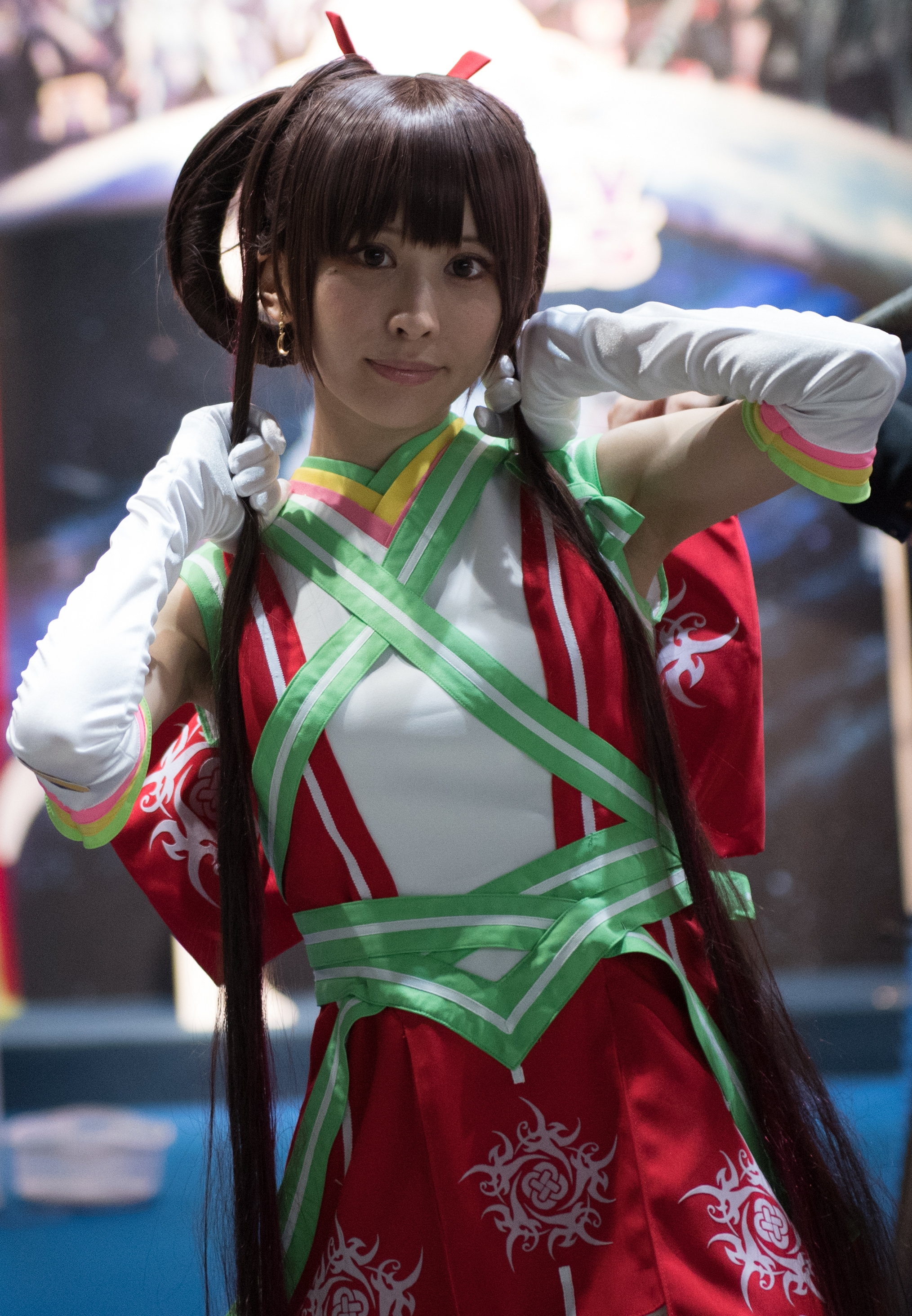 2016年9月15日から18日に行われた東京ゲームショウ2016の角川ブースの「GOD WARS ～時をこえて～」での立石都美の写真です。「GOD WARS 〜時をこえて〜」に登場する“カグヤ”のコスプレを披露。